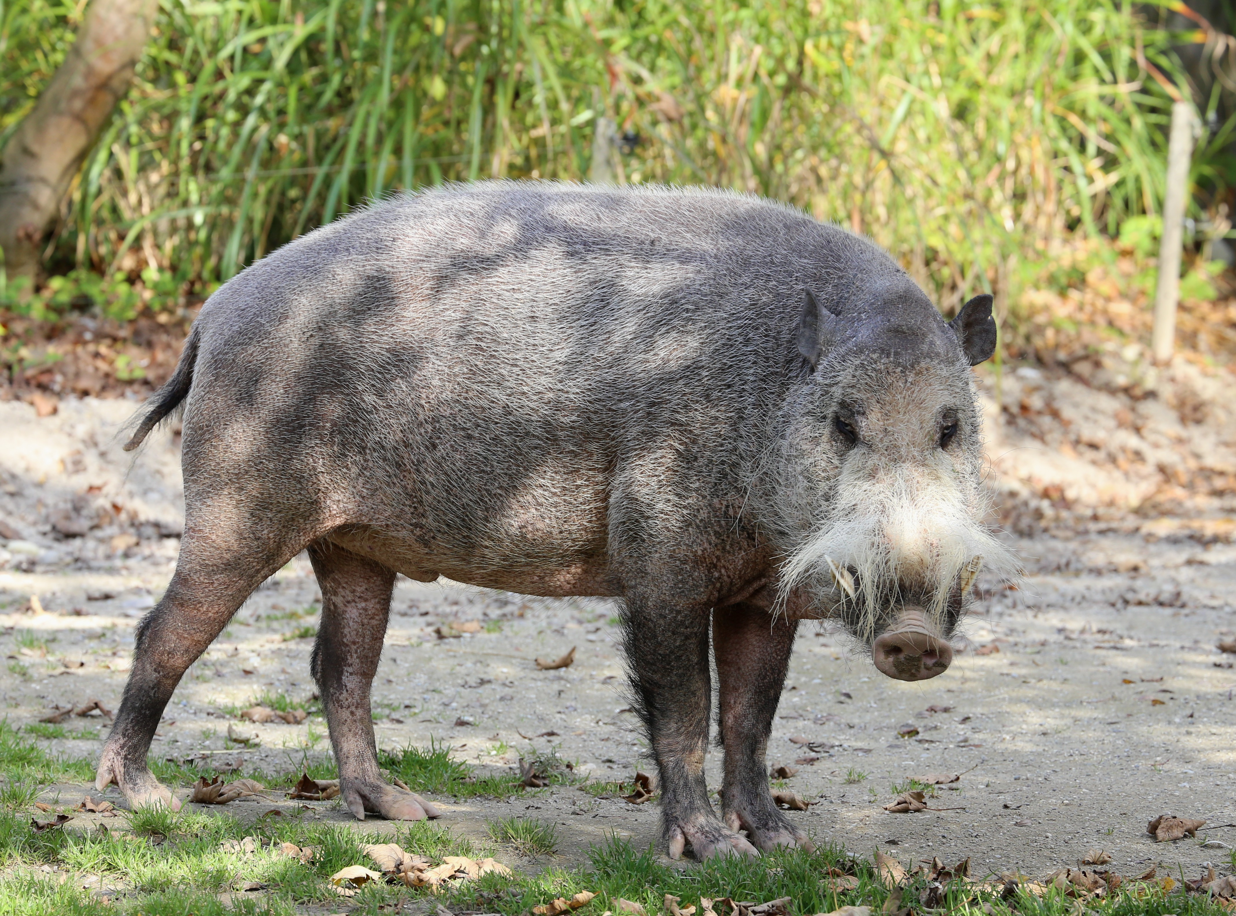 Bartschwein (Sus barbatus), Tierpark Hellabrunn, München